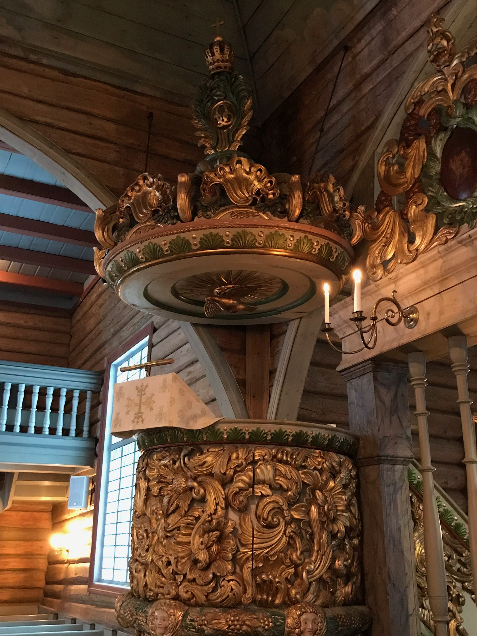 Prekestolen i Biri kirke.